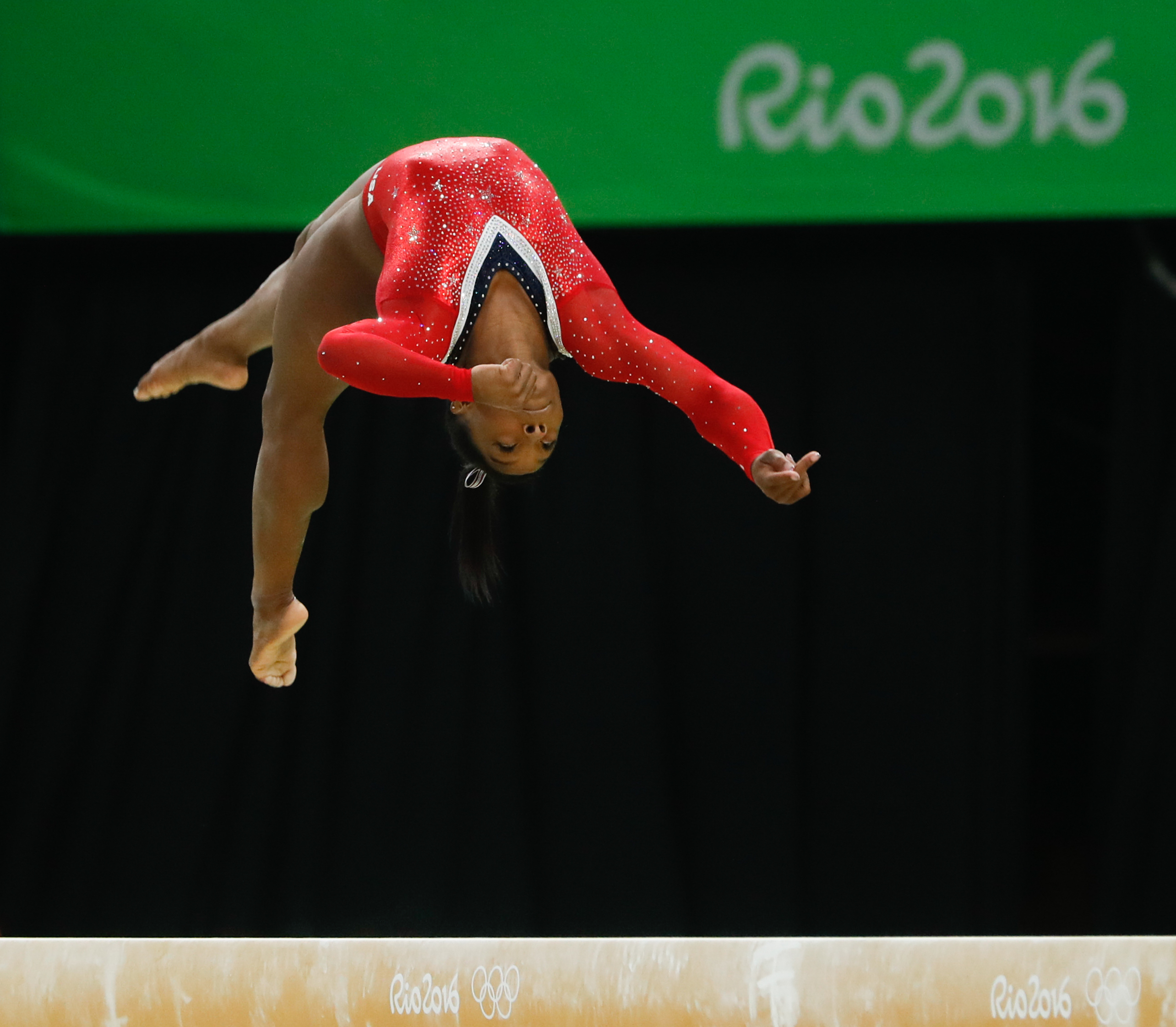 Rio de Janeiro - Ginasta Simone Biles, dos Estados Unidos, termina com medalha de bronze a prova final da trave (Fernando Frazão/Agência Brasil)